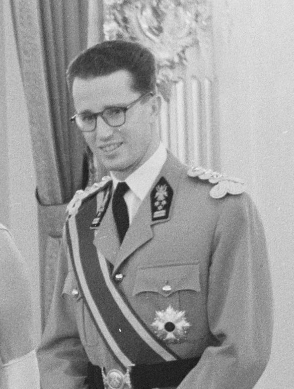 v.l.n.r. Prins Albert, Prinses Paola, Prinses Beatrix, Boudewijn I van België. Location: België